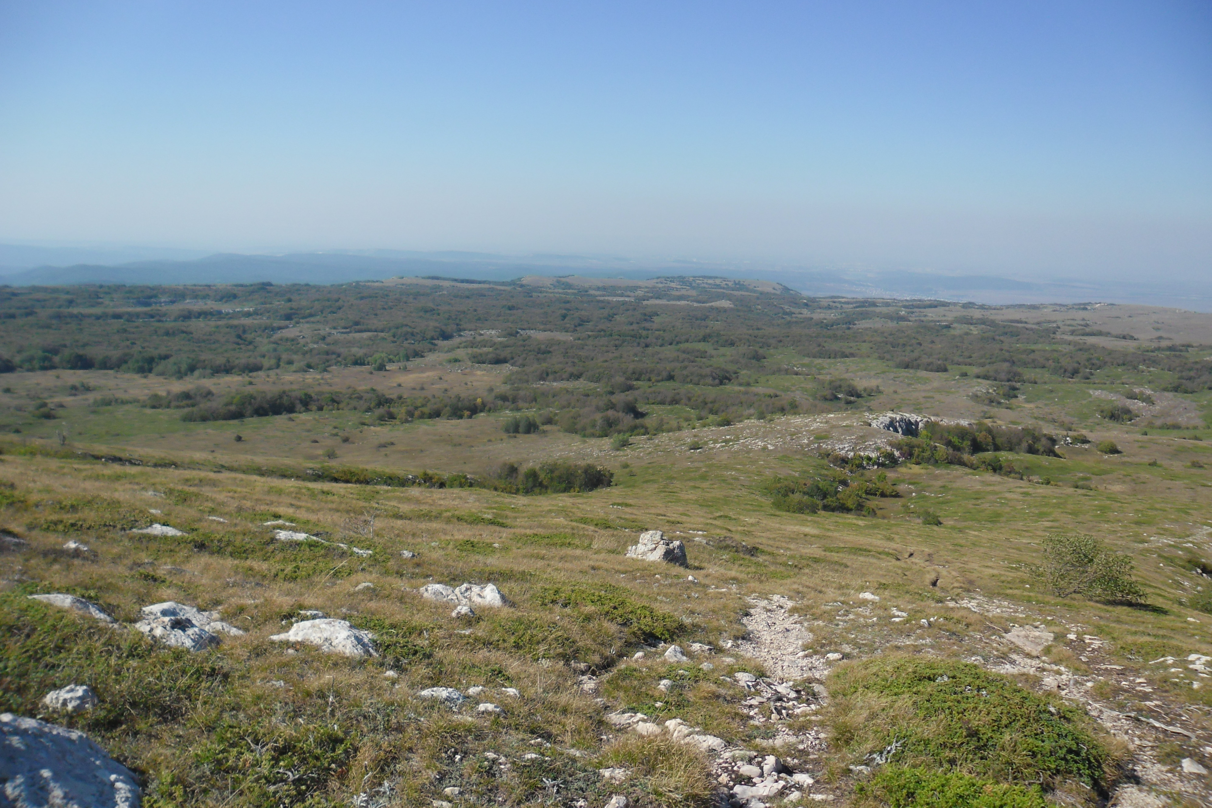 Фото